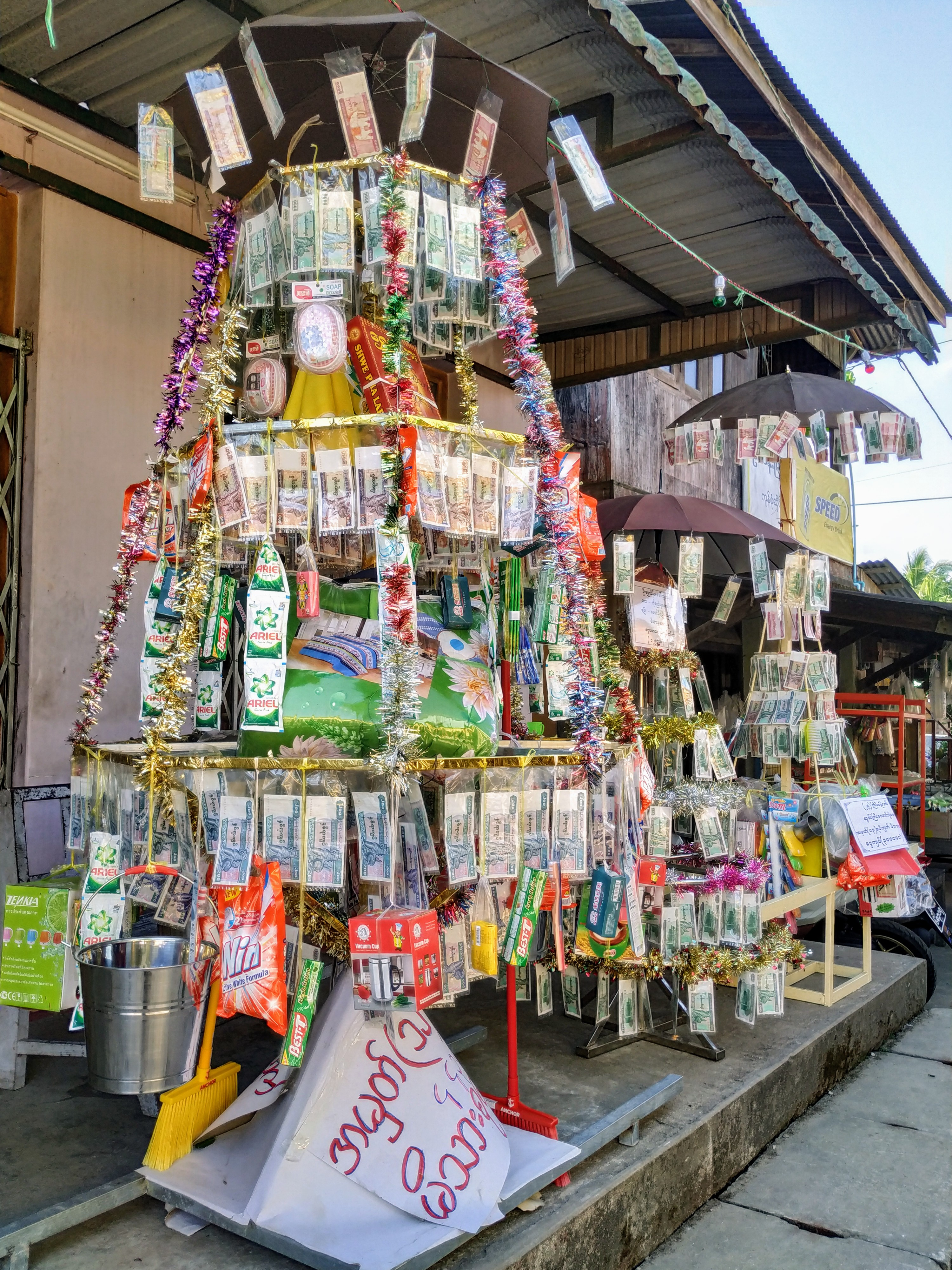 ကထိန် ပဒေသာပင်များ